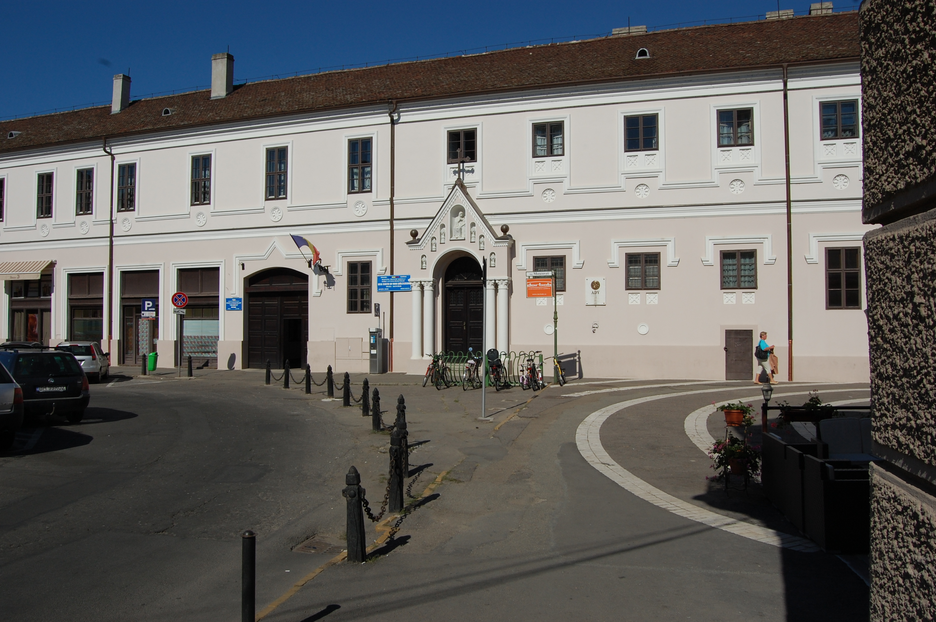 Ansamblul fostei mănăstiri a Ursulinelor, azi Liceul "Ady Endre"